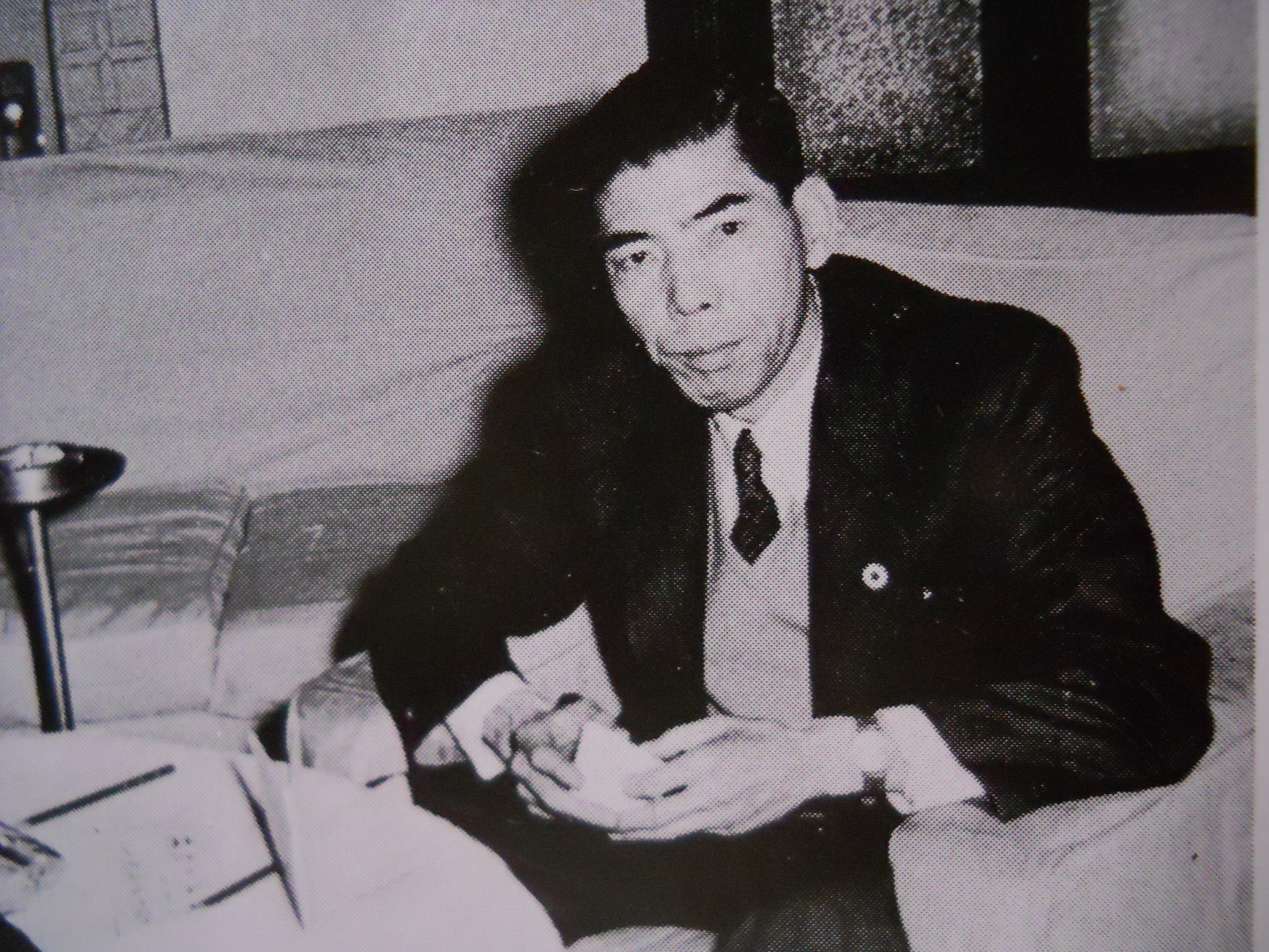 Zirou Ishiba 02